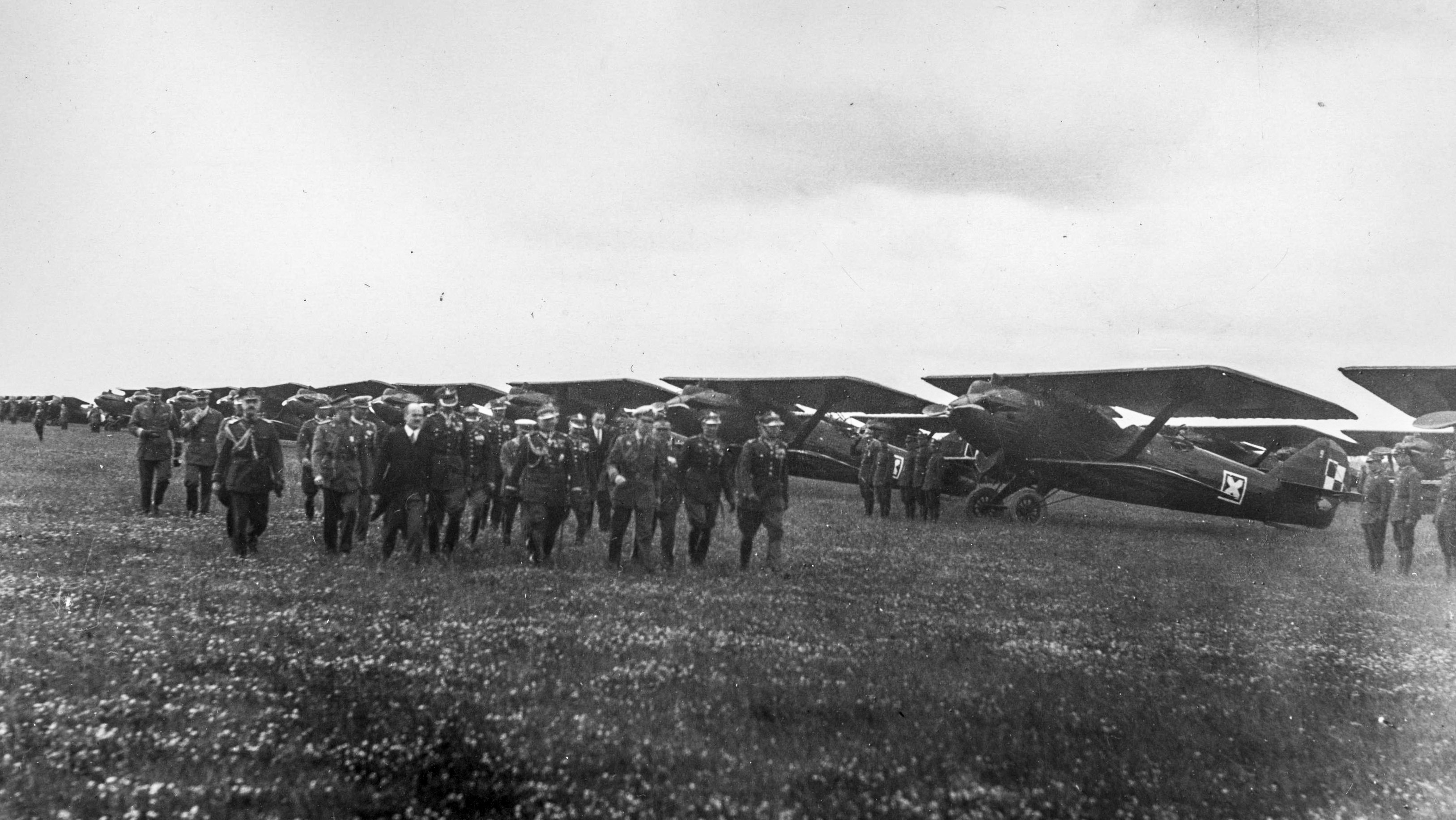 Wizyta brata króla Rumunii księcia Mikołaja w Polsce 27 czerwca 1933. Książę Mikołaj w asyście wojskowych dokonuje przeglądu 1 Pułku Lotniczego na lotnisku wojskowym na Okęciu. Widoczne samoloty Breguet 19 B2. Koncern Ilustrowany Kurier Codzienny - Archiwum Ilustracji. Sygnatura: 3/1/0/4/1385/12, dawna 1-D-1385-12